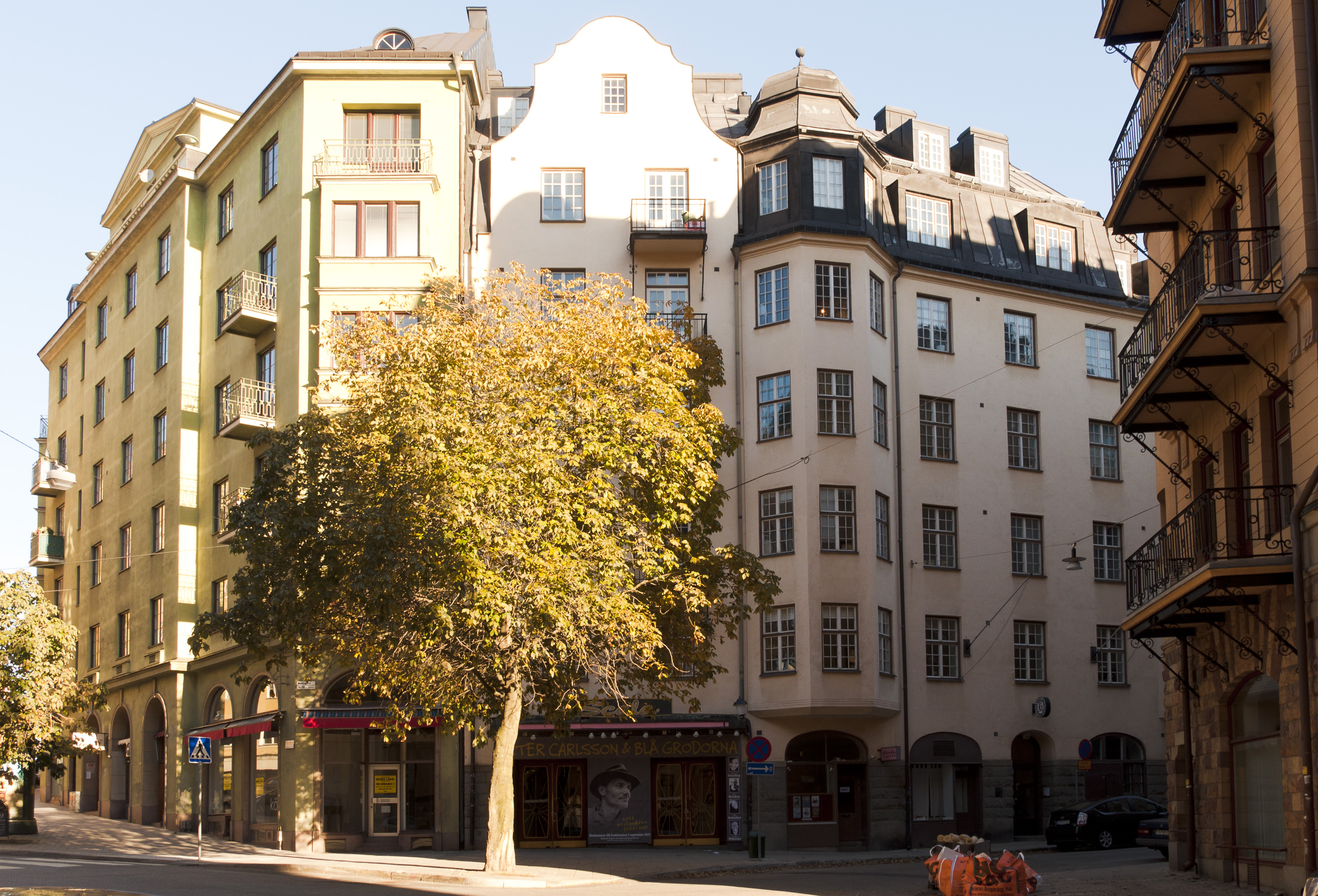 Wallingatan 32, 34 (Lindbacken 4). Teatern "Scalateatern". Byggnadsår 1913-14, arkitekt Sam Kjellberg (1868-1939), byggherre Engelska Episkopalförsamlingen, byggmästare J Landström.